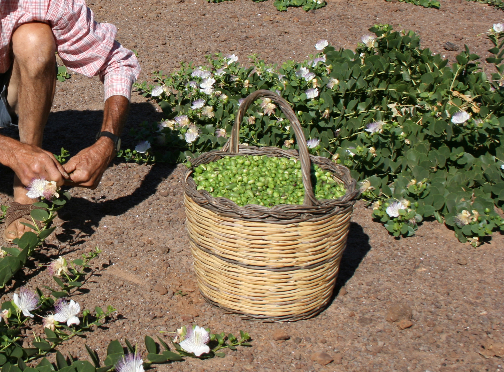 Paniere (panaru in pantesco) per la raccolta di capperi a Pantelleria, Italia.